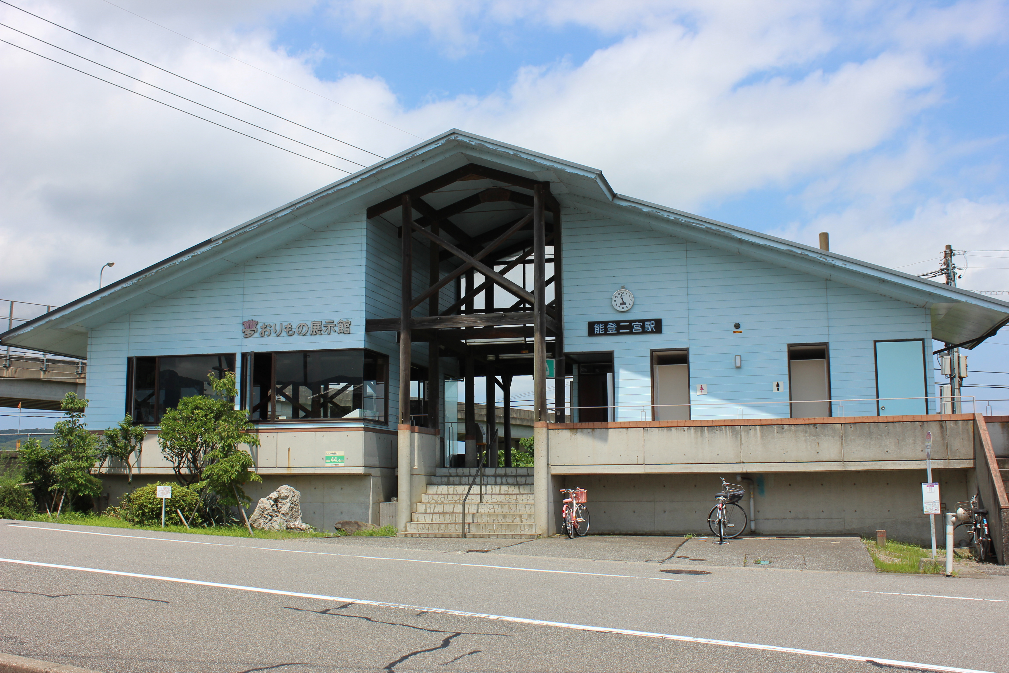 能登二宮駅（石川県鹿島郡中能登町） Canon EOS Kiss X5